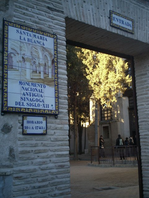 Sinagoga en Toledo, España